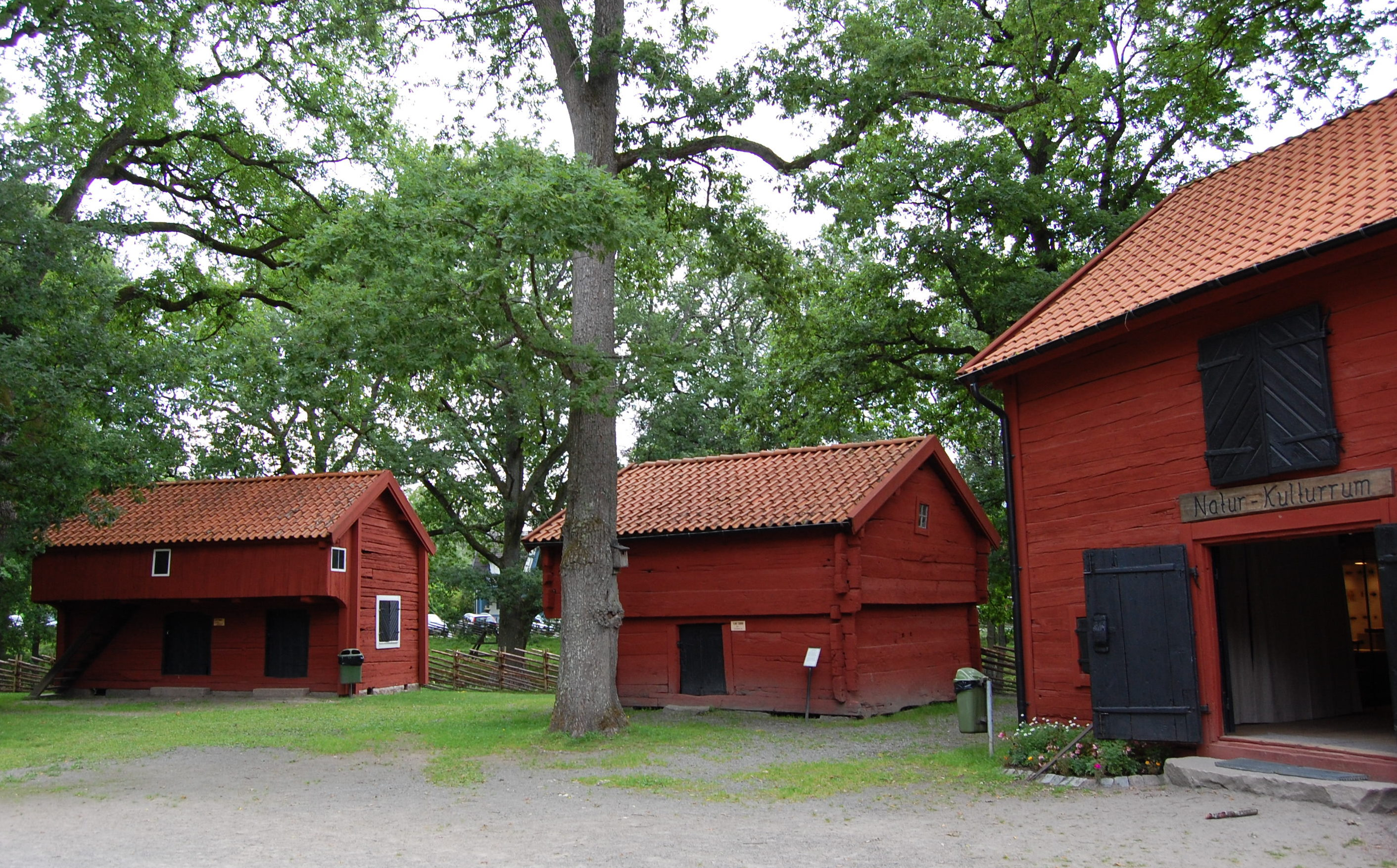 historische Holzhäuser im Park Apladalen in Värnamo